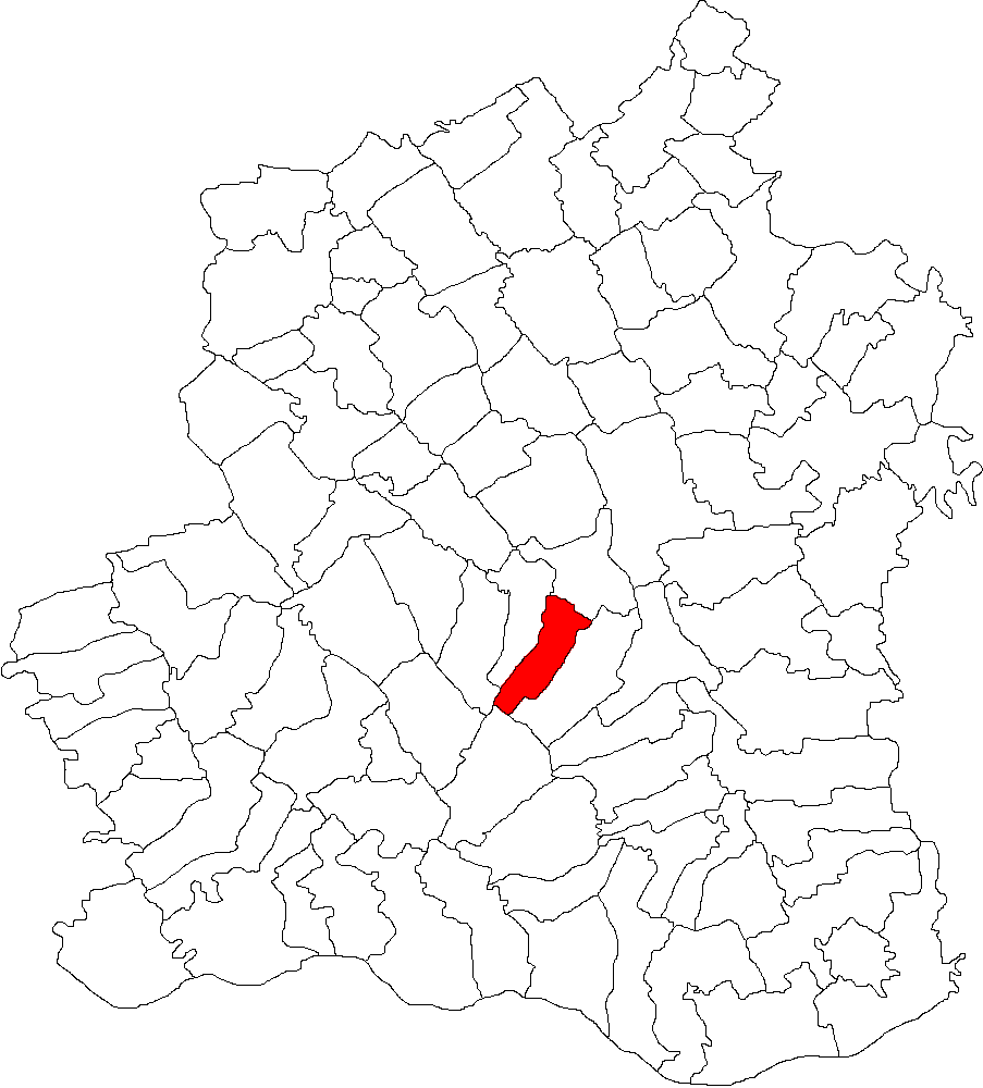 Categorie:Hărţi ale judeţului Teleorman